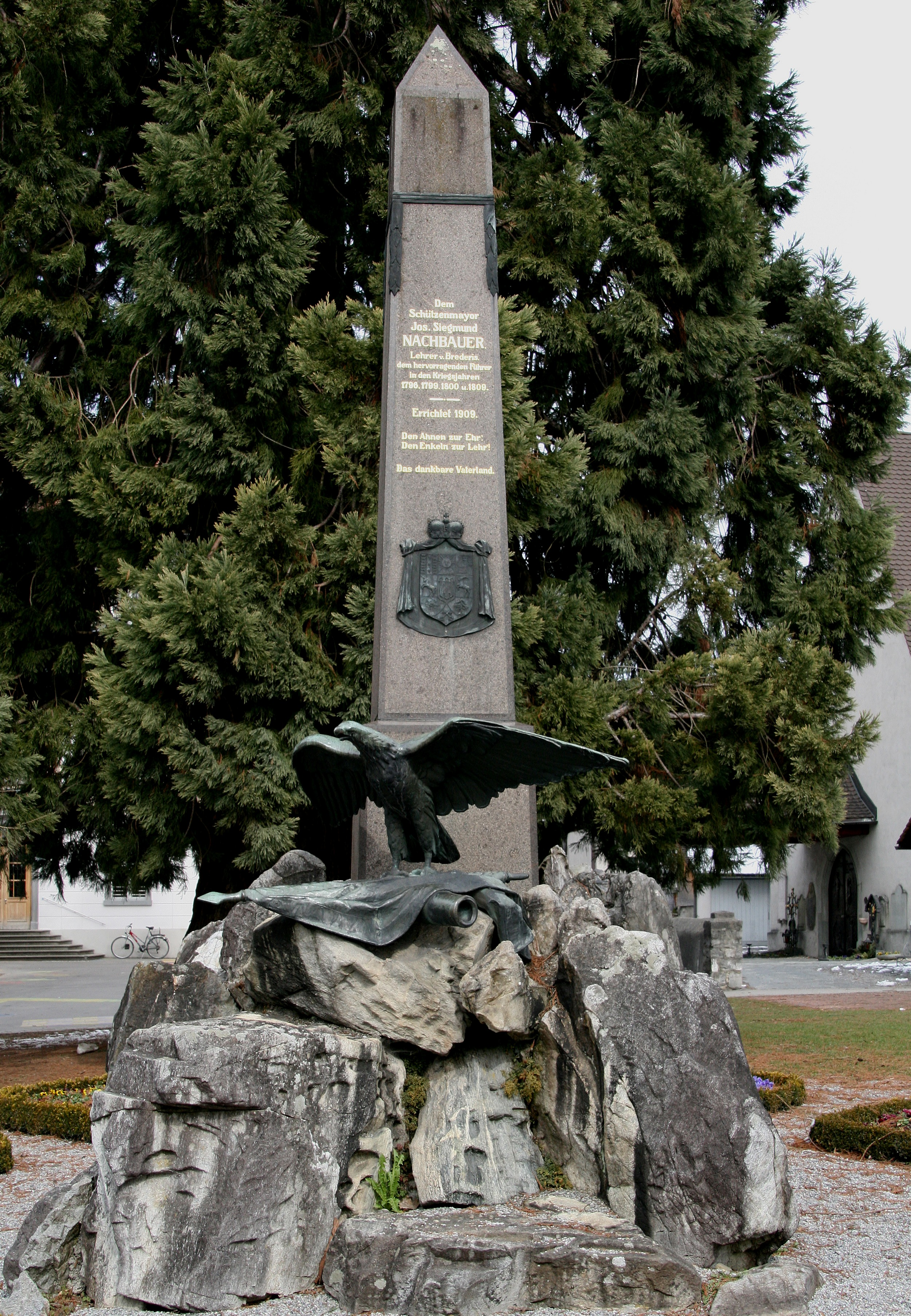 Denkmal für Mayor Josef Sigmund Nachbauer (1796-1809) errichtet 1909in Rankweil, Vorarlberg.